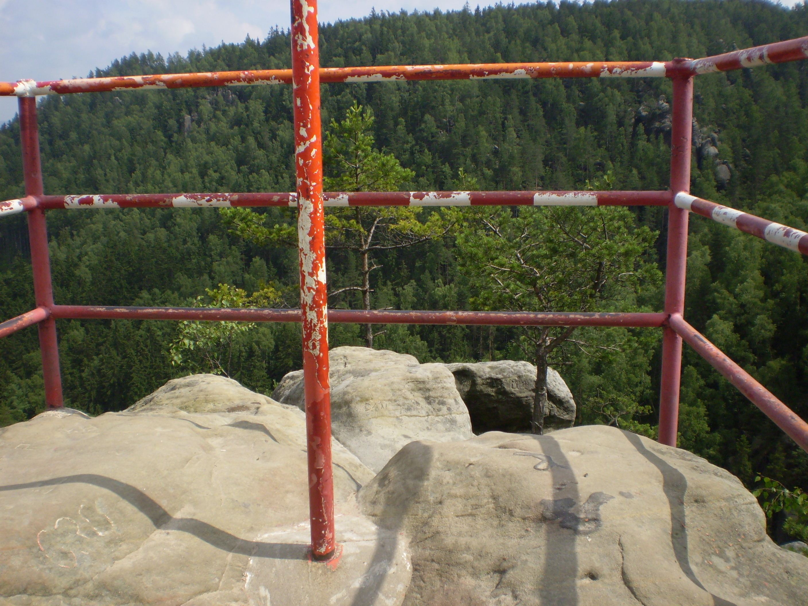 Střmen.